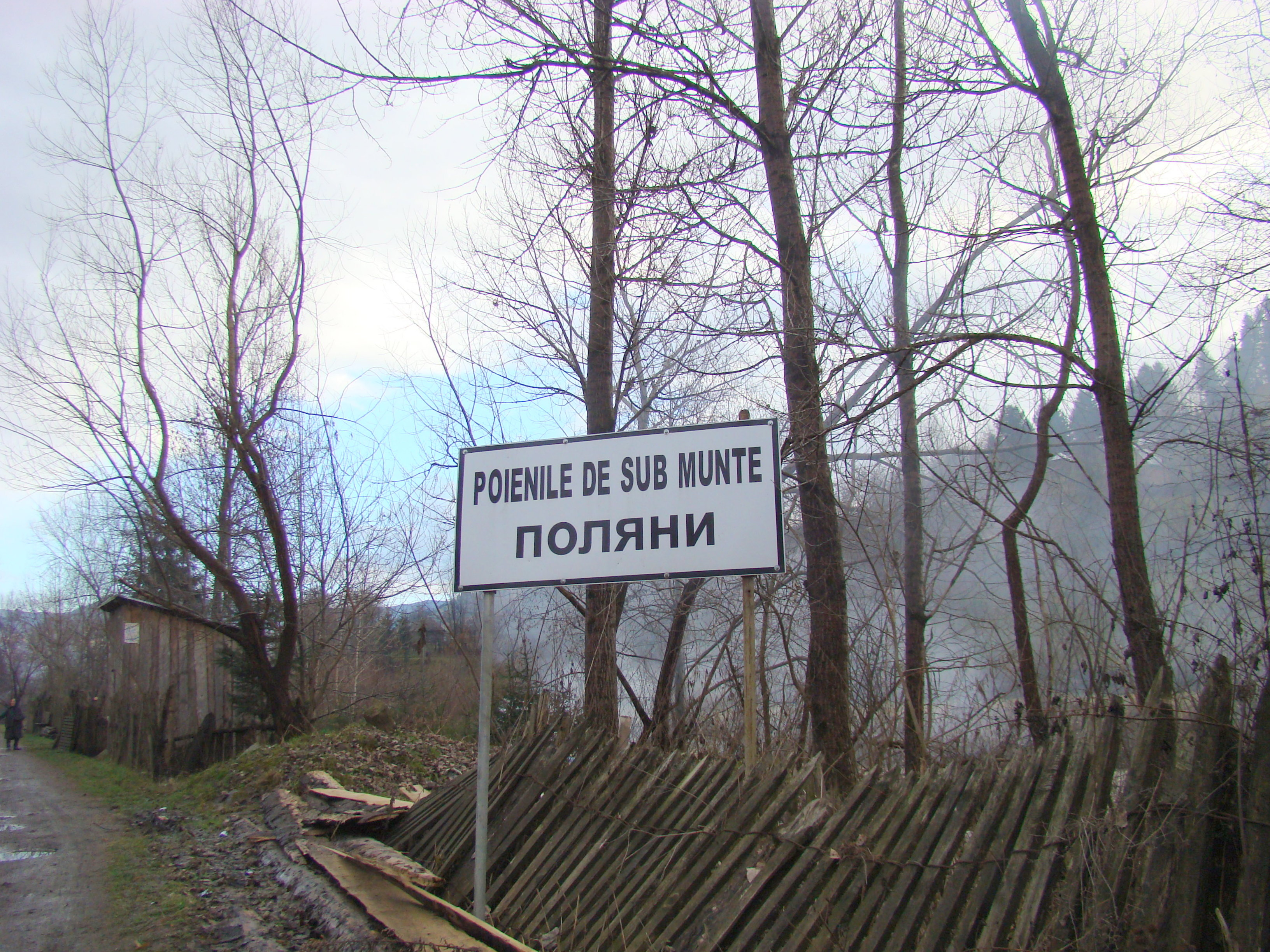 Poienile de sub Munte, județul Maramureș